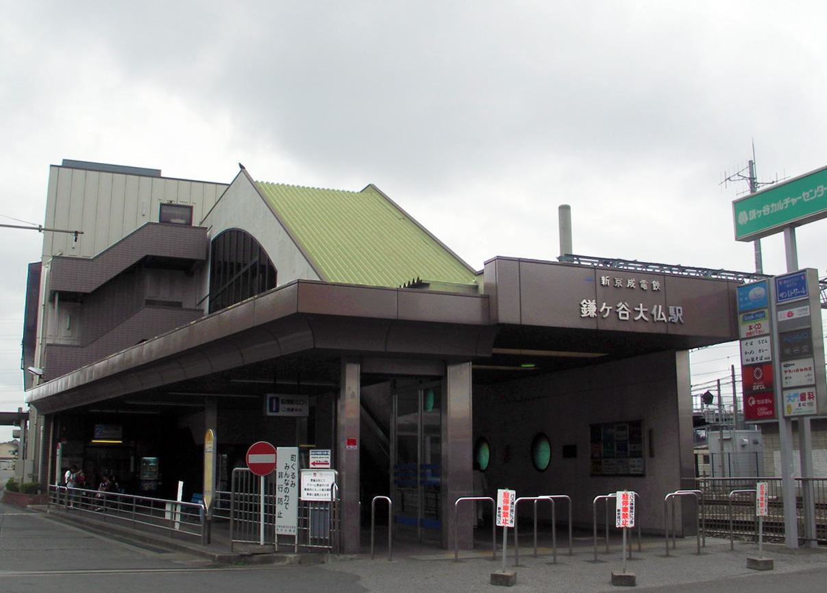 Kamagaya Daibutsu station, Shin-Keisei Line, Chiba, Japan, 鎌ヶ谷大仏駅